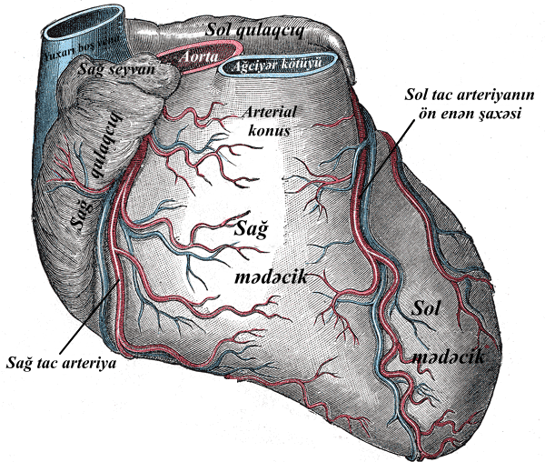 Ürəyin sağ və sol tac damarlarının təsviri